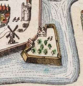 Uitsnede met Utrechtse stadsplattegrond uit de Atlas van Loon uit 1649. In de uitsnede staan oa bastion sterrenburg en bijlhouwerstoren.